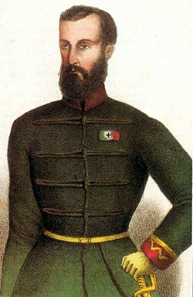 Guyon Richárd honvéd vezérőrnagy (szinezett litográfia)